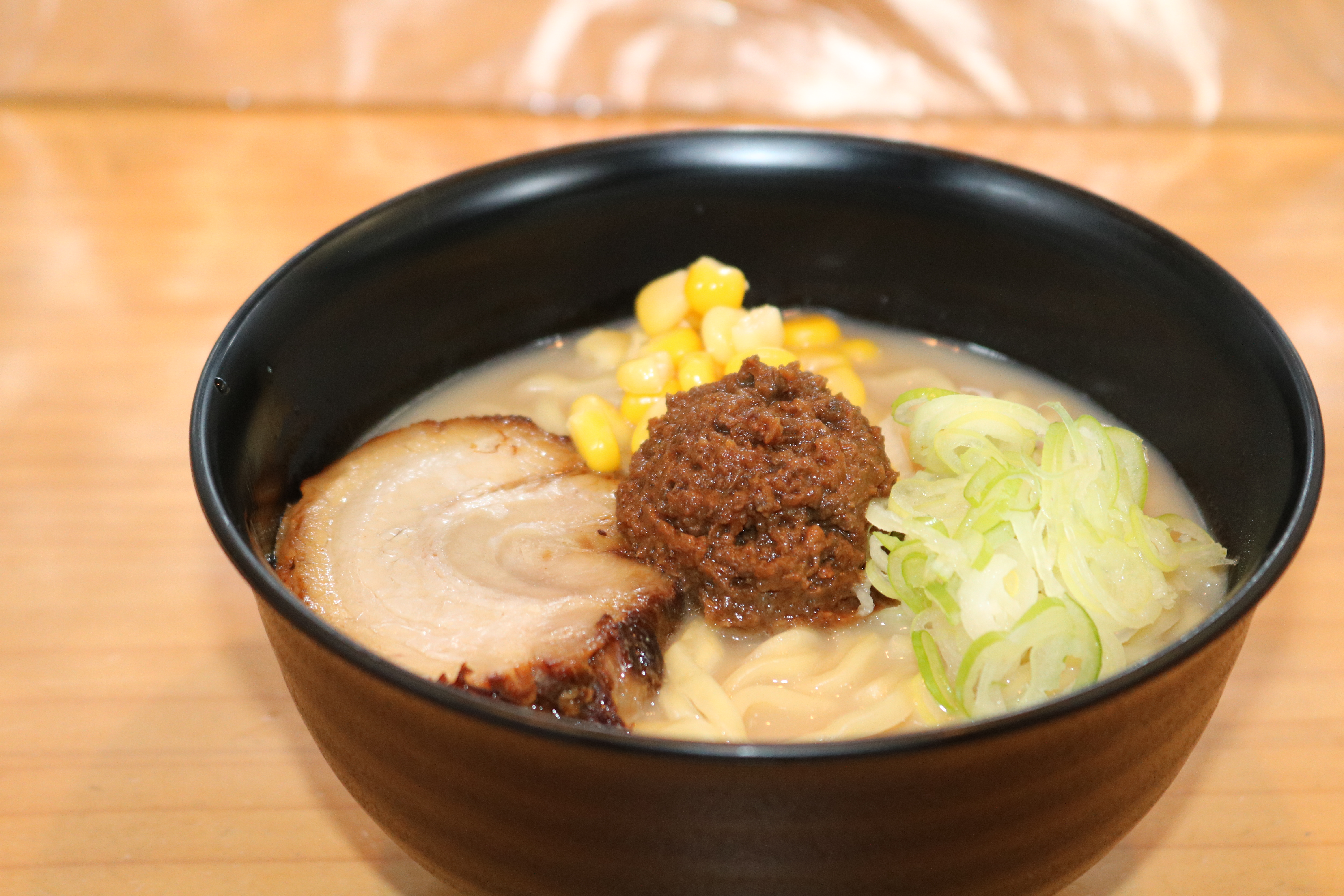 小矢部市商工会青年部使用のおやべホワイトラーメン